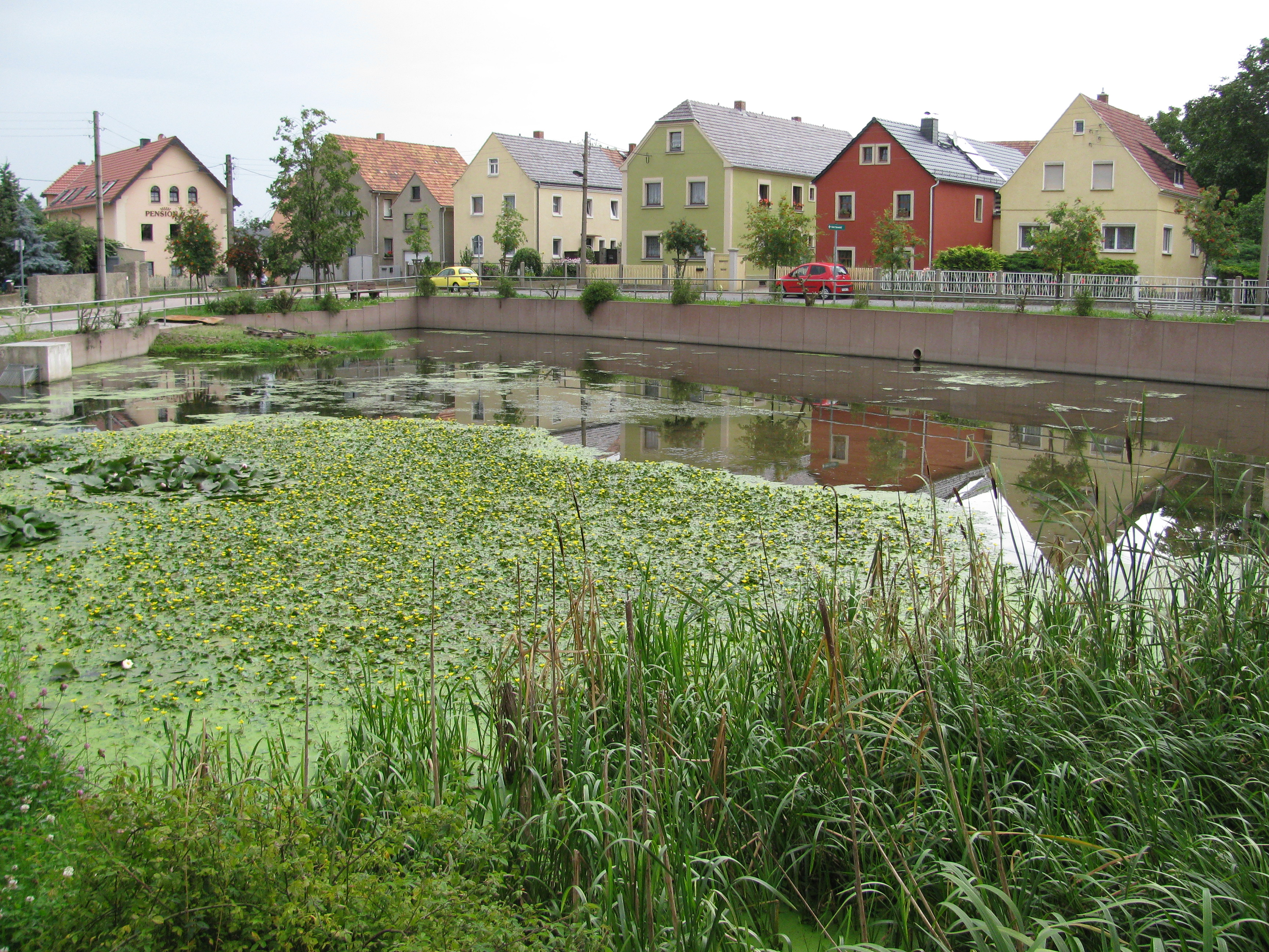 Dorfteich im Dorfkern von Reichenberg, Gemeinde Moritzburg, Sachsen